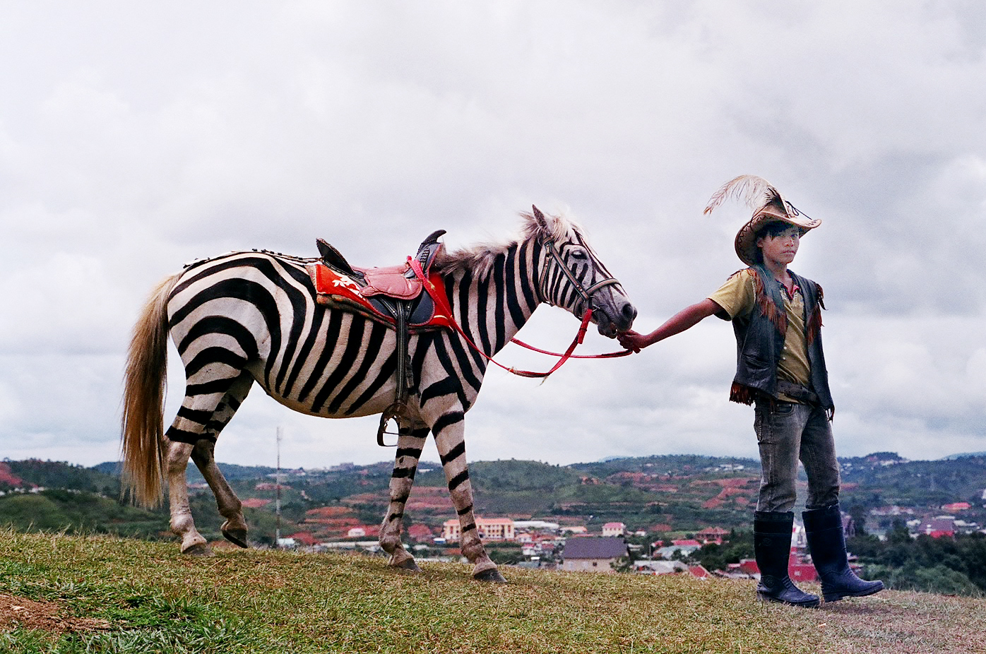 Cowboy (Zebra Boy) on Lang Biang Mountain, Da Lat